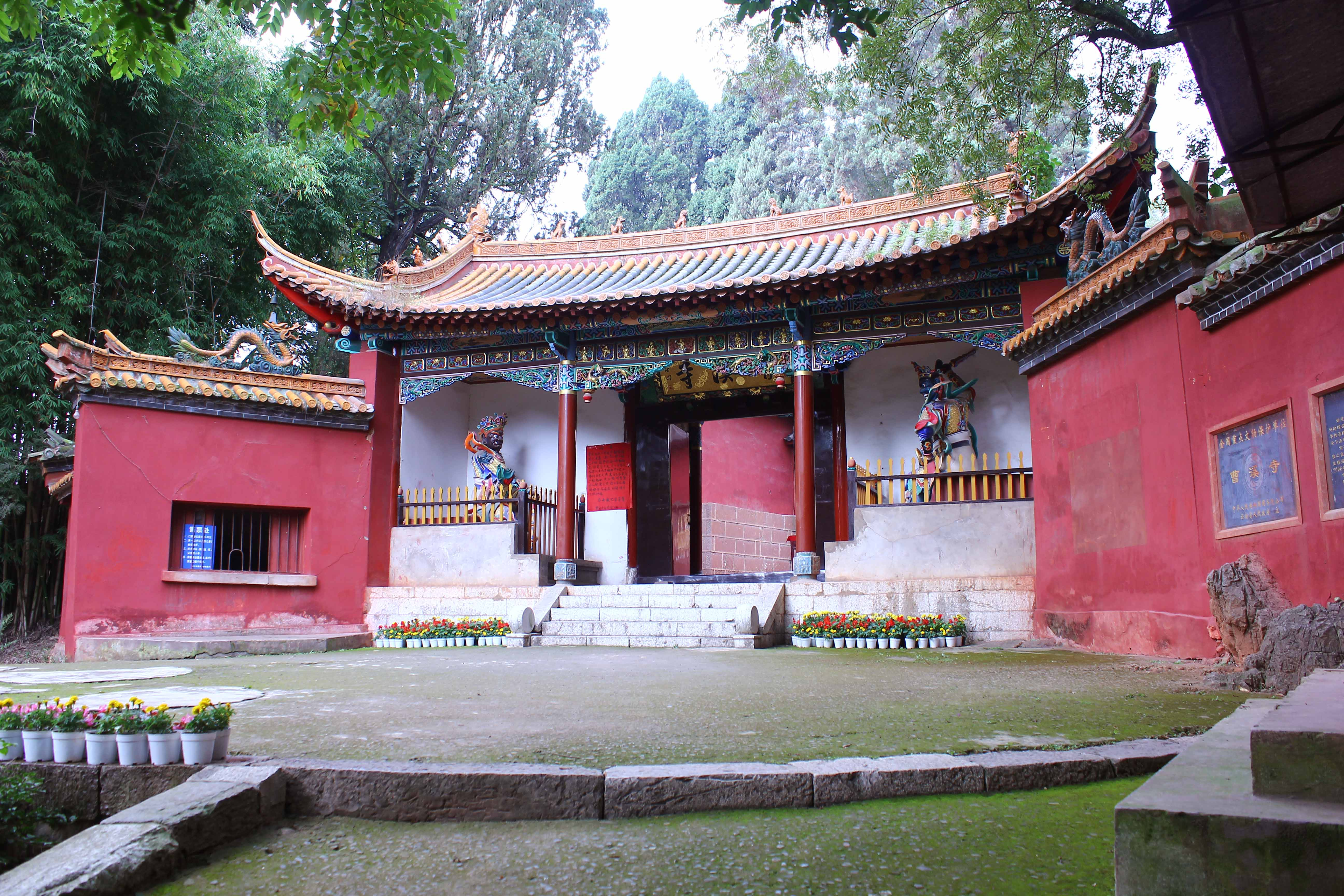 云南安宁曹溪寺